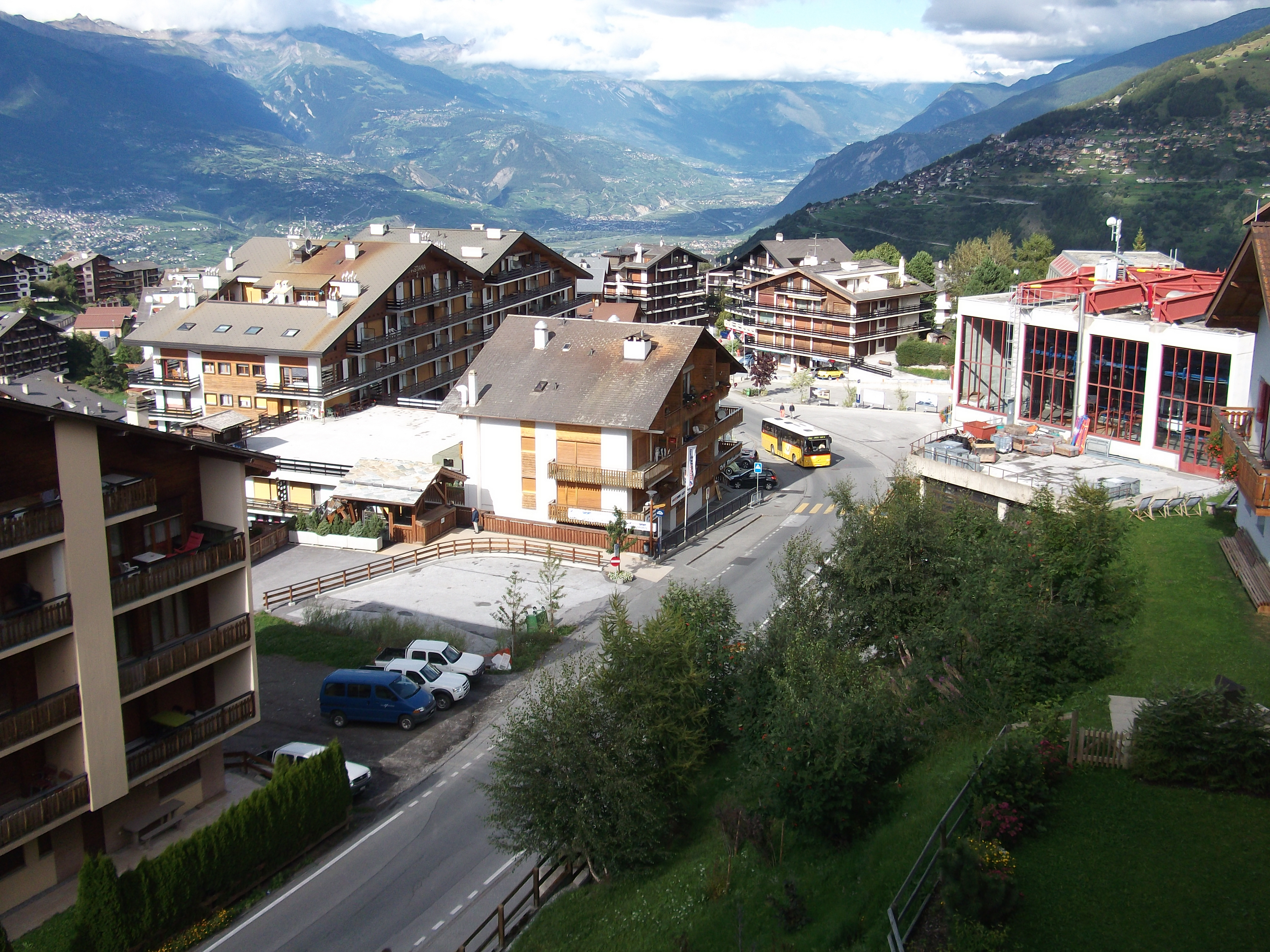 מרכז הכפר הוט-ננדה ותחנת הרכבל (מימין)